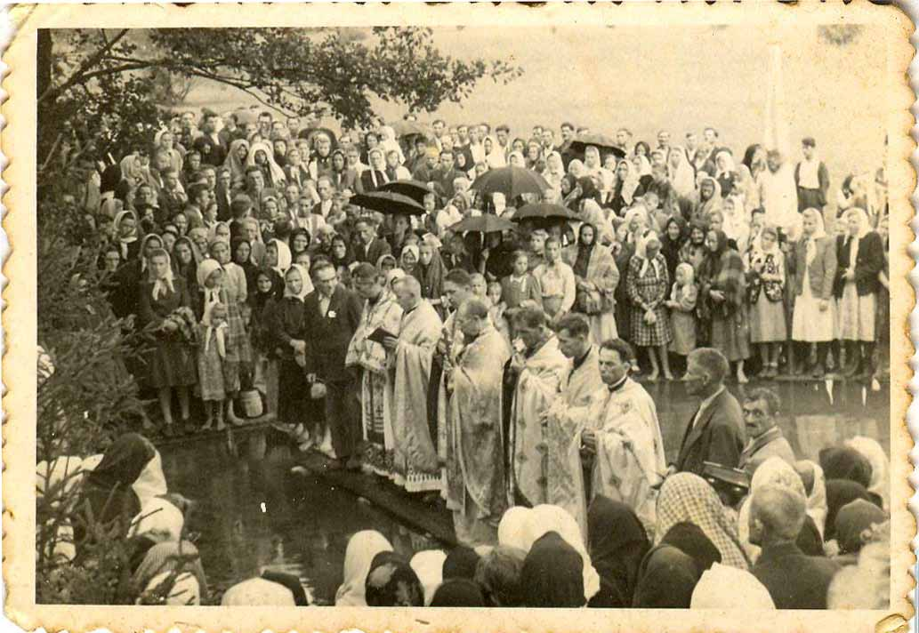 Novosilka. Patronal feast. 1930s